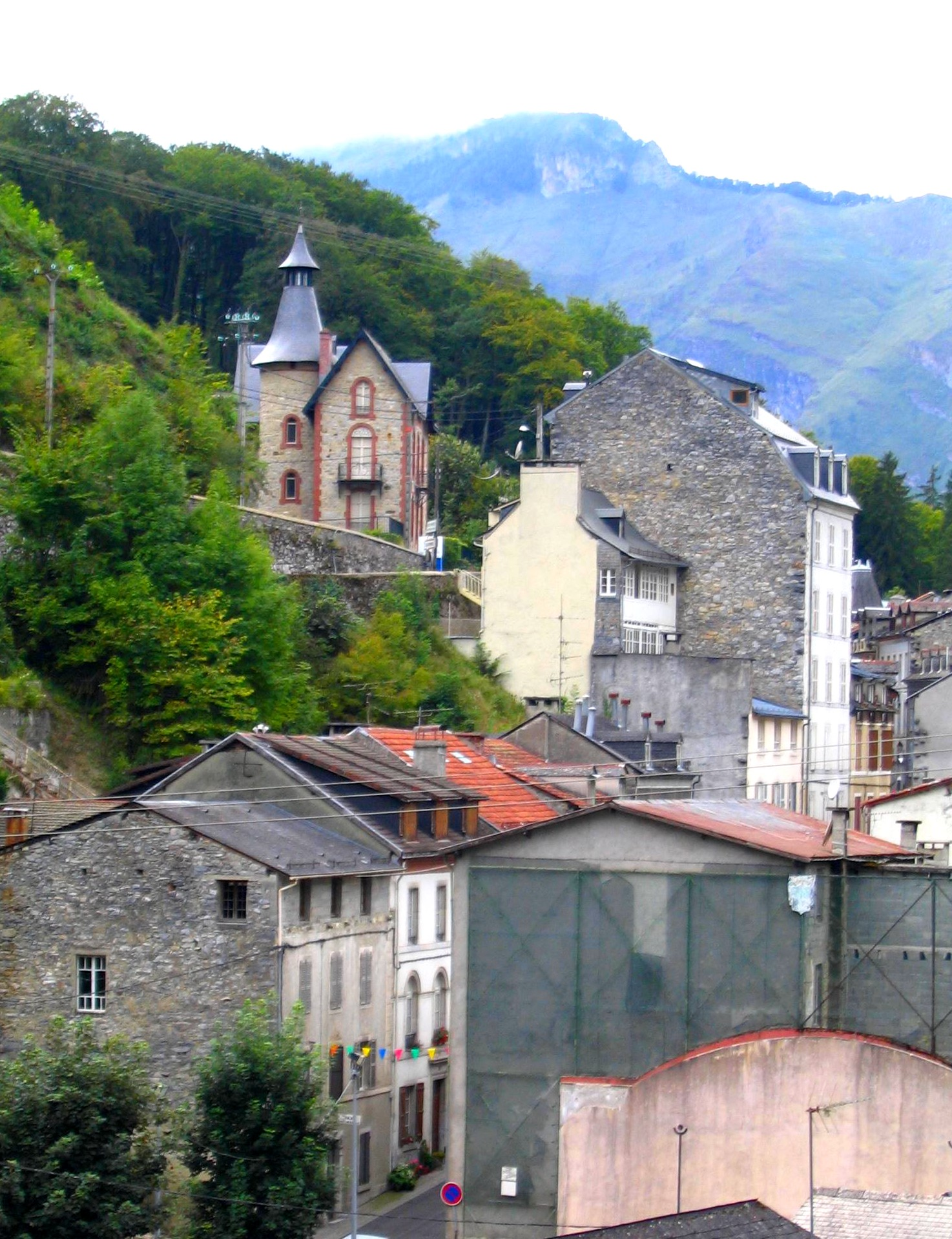 Eaux-Bonnes, Pyrénées Atlantiques, France